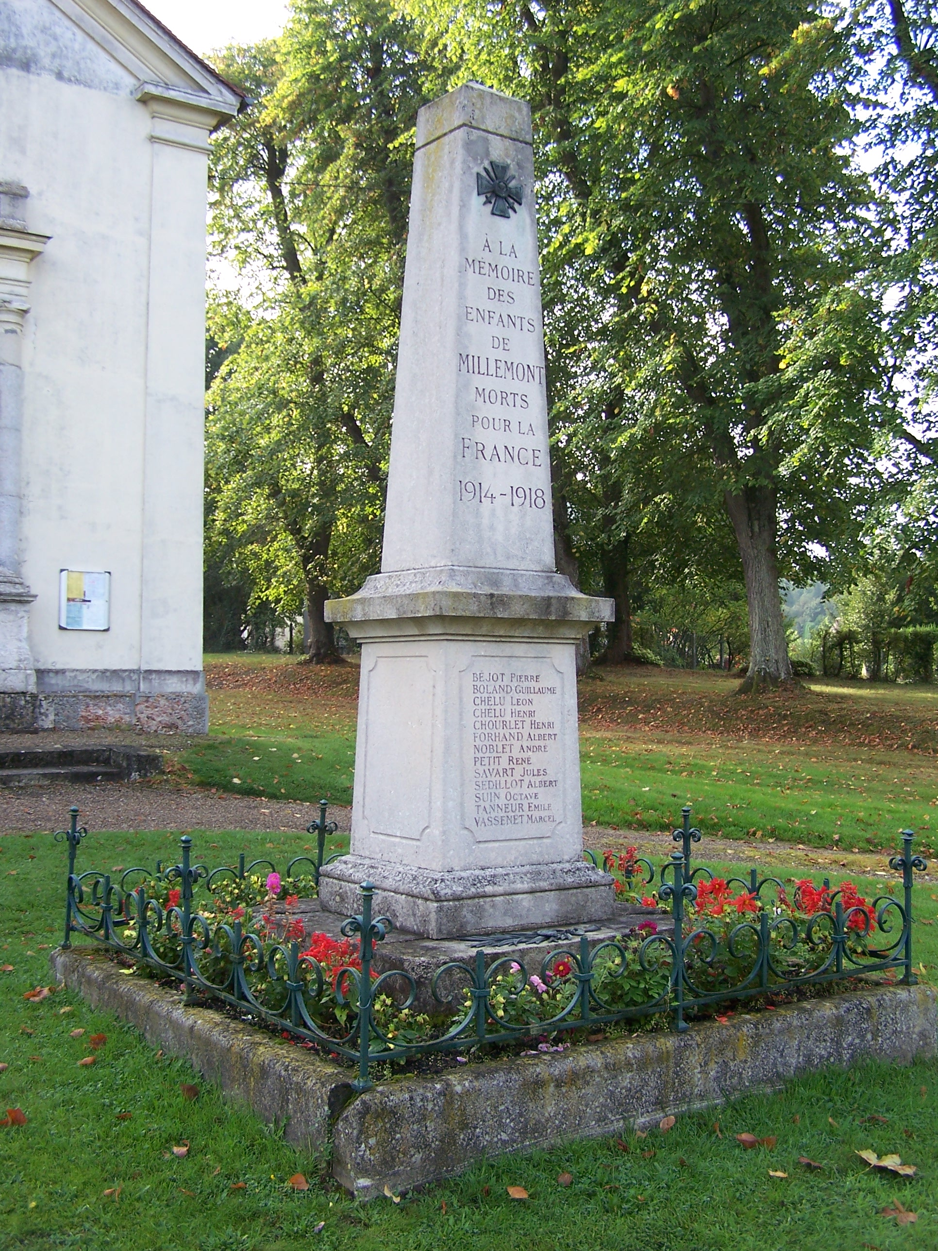 Monument aux morts de Millemont (Yvelines, France)